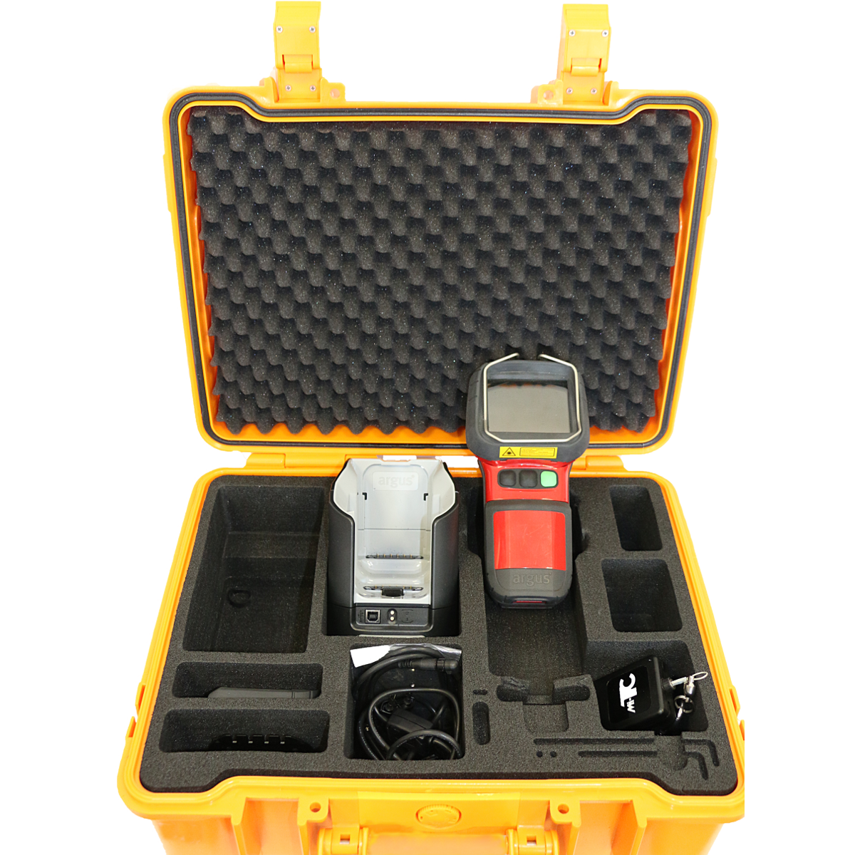 La caméra thermique certifiée NFPA compacte et légère